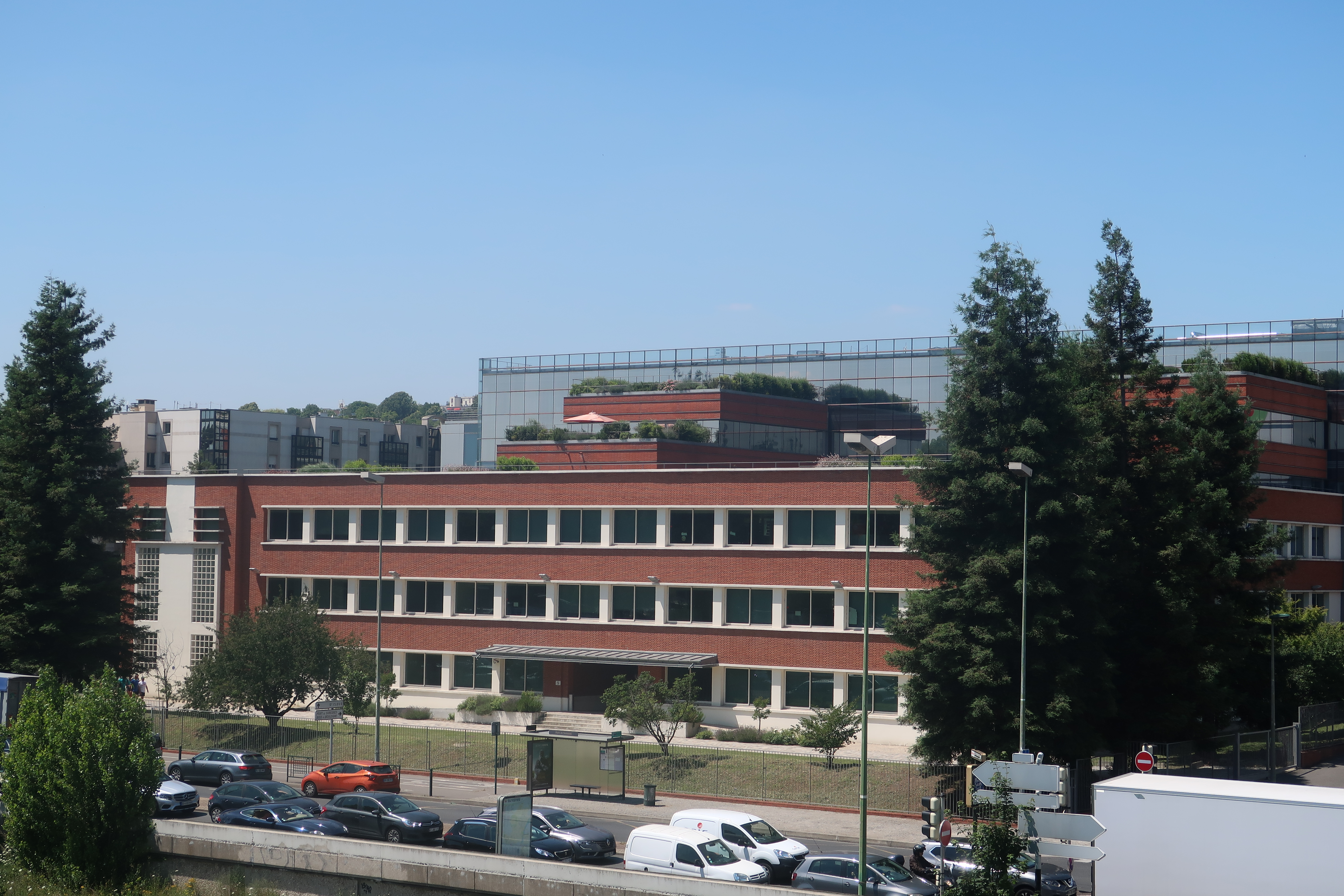 Siège social du groupe Havas vu du sud (ancienne parfumerie Coty, puis Usine Agfa Gevaert) à Suresnes.